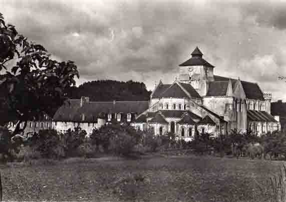 L'abbaye_de_Fontgombault_dans_les_années_1960